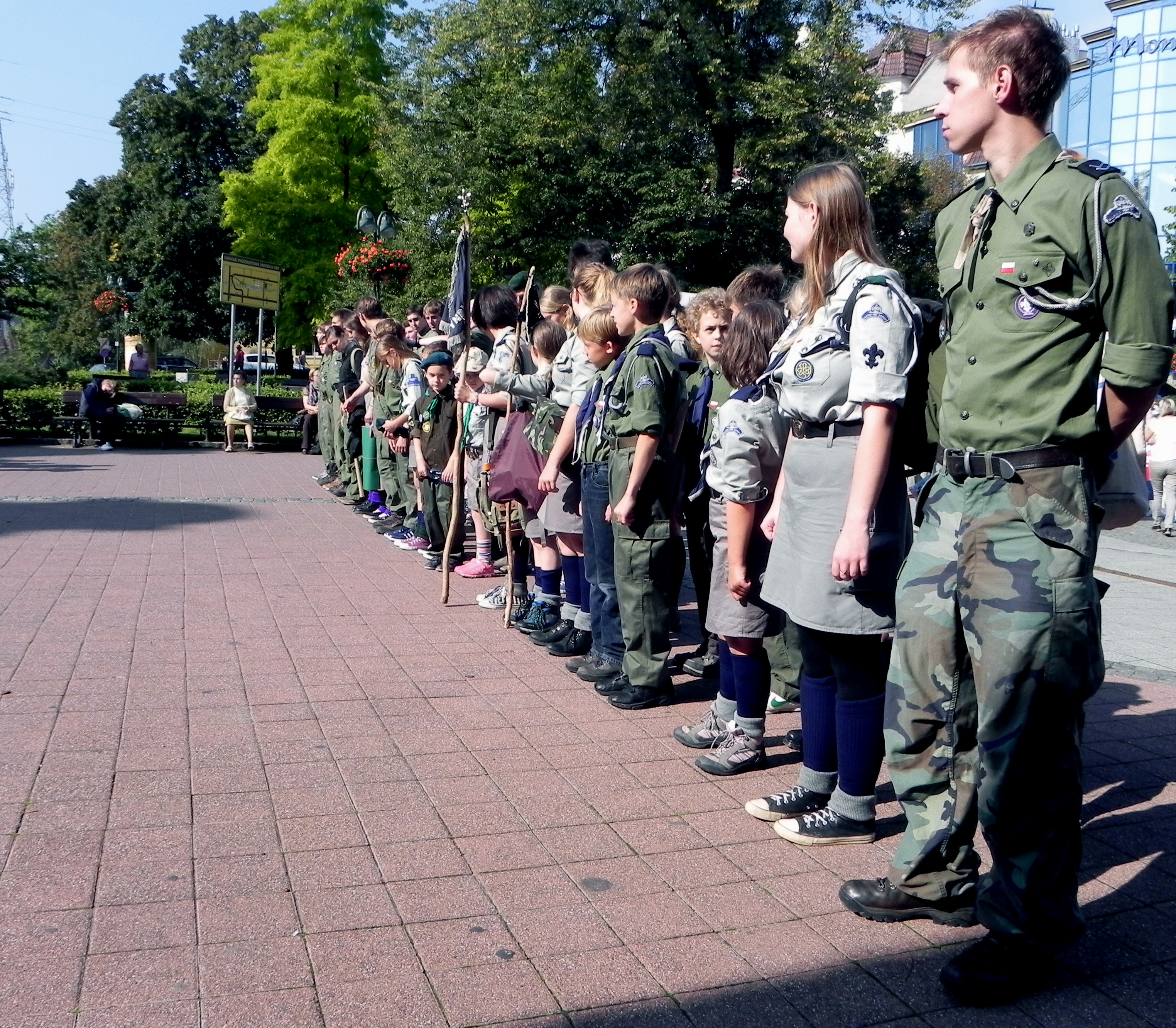 W szeregu